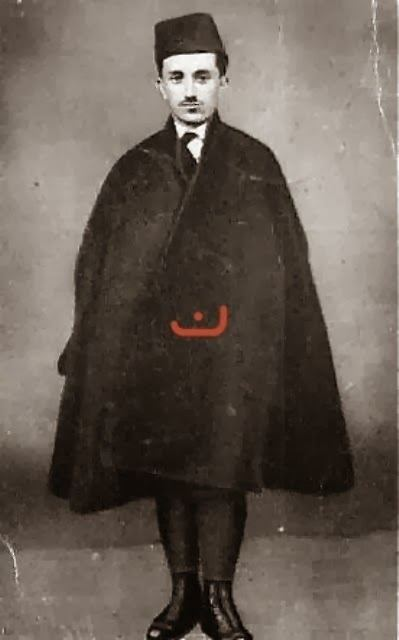 Avni Rüstemi milletvekili